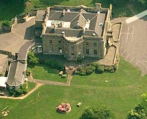 junior school